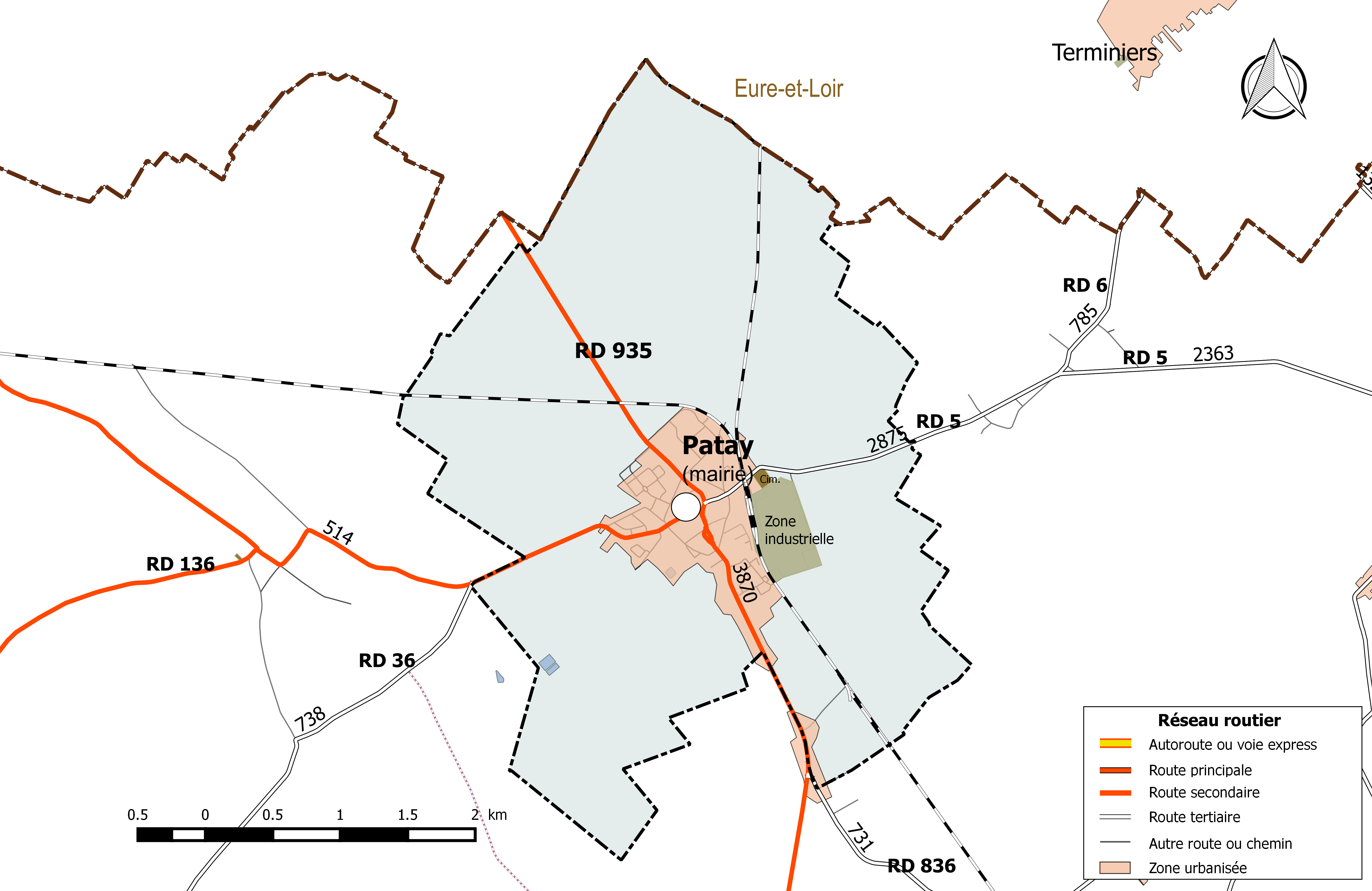 Carte du réseau routier de la commune de Patay.